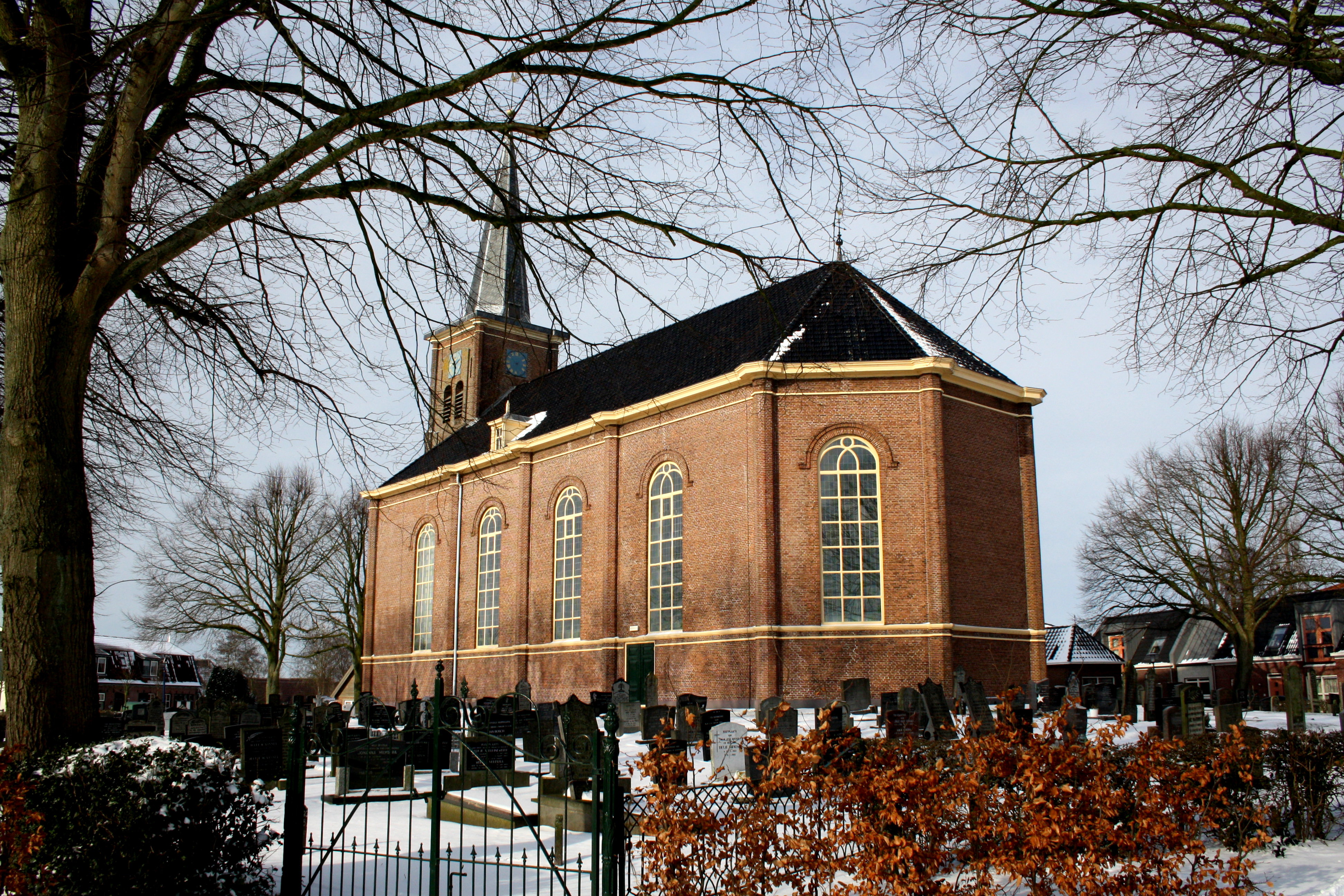 Koudum (Fr) NH kerk uit 1857